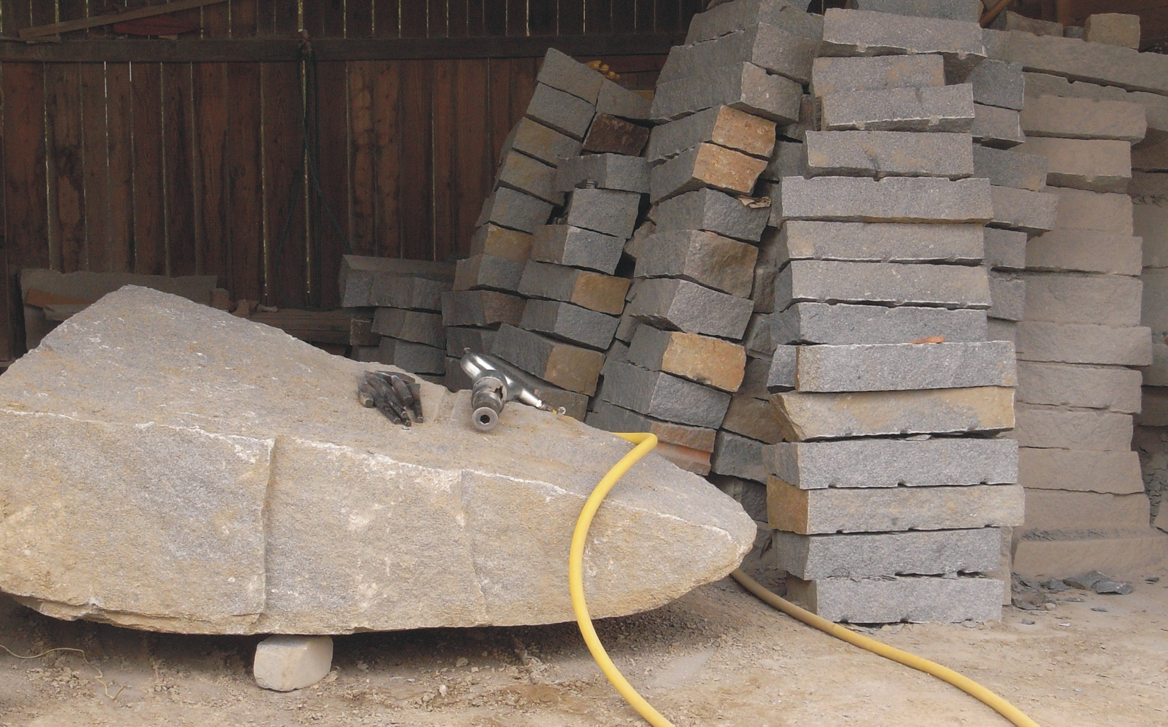 Spalten von Natursteinblöcken